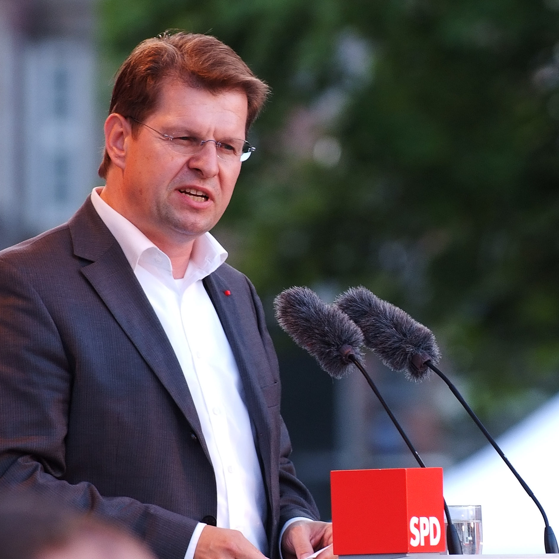 Ralf Stegner, SPD chairman of Schleswig-Holstein